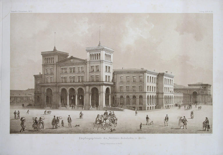 „Empfangsgebäude des Görlitzer Bahnhofes in Berlin” from: Zeitschrift für Bauwesen, Verlag v. Ernst & Korn in Berlin